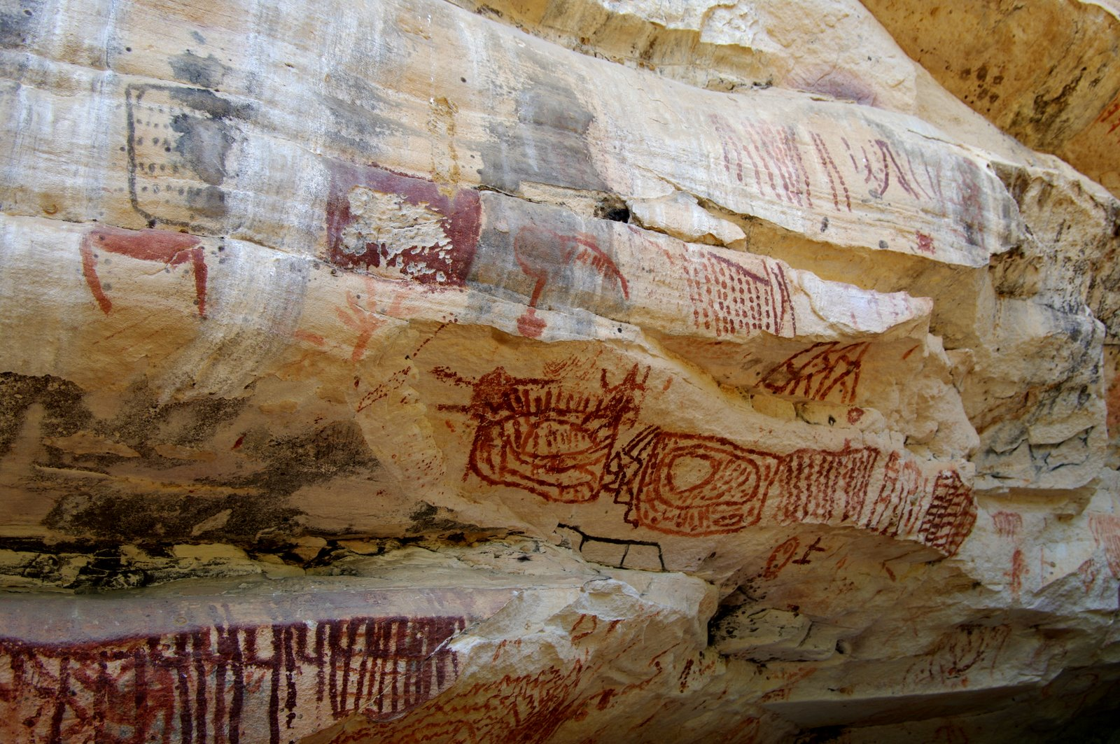 Pinturas Rupestres - Parque Nacional do Catimbau - Pernambuco - Brasil